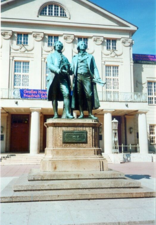 Denkmal für Goethe und Schiller vor dem Deutschen Nationaltheater in Weimar